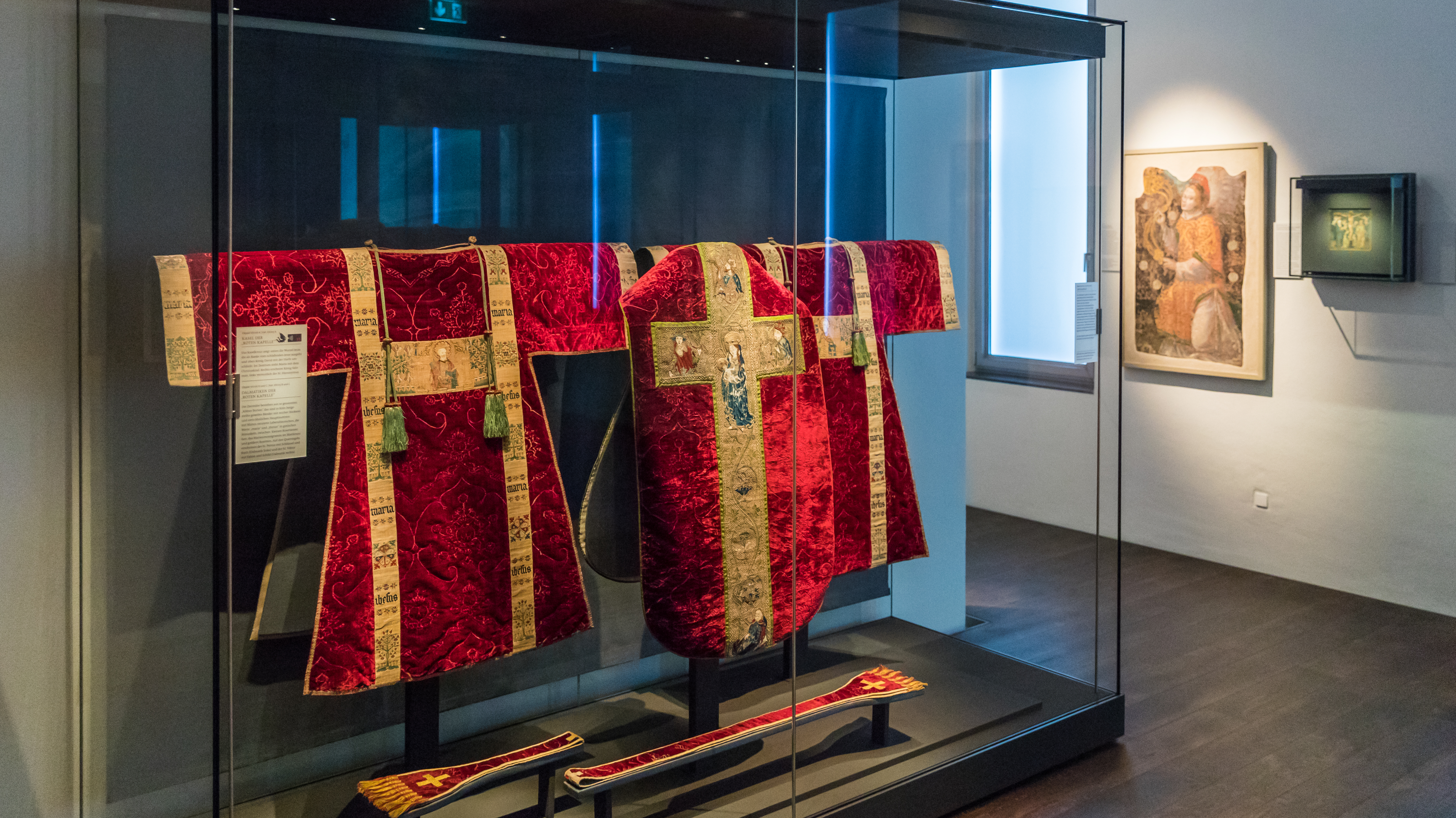 Stiftsmuseum Xanten: Paramente